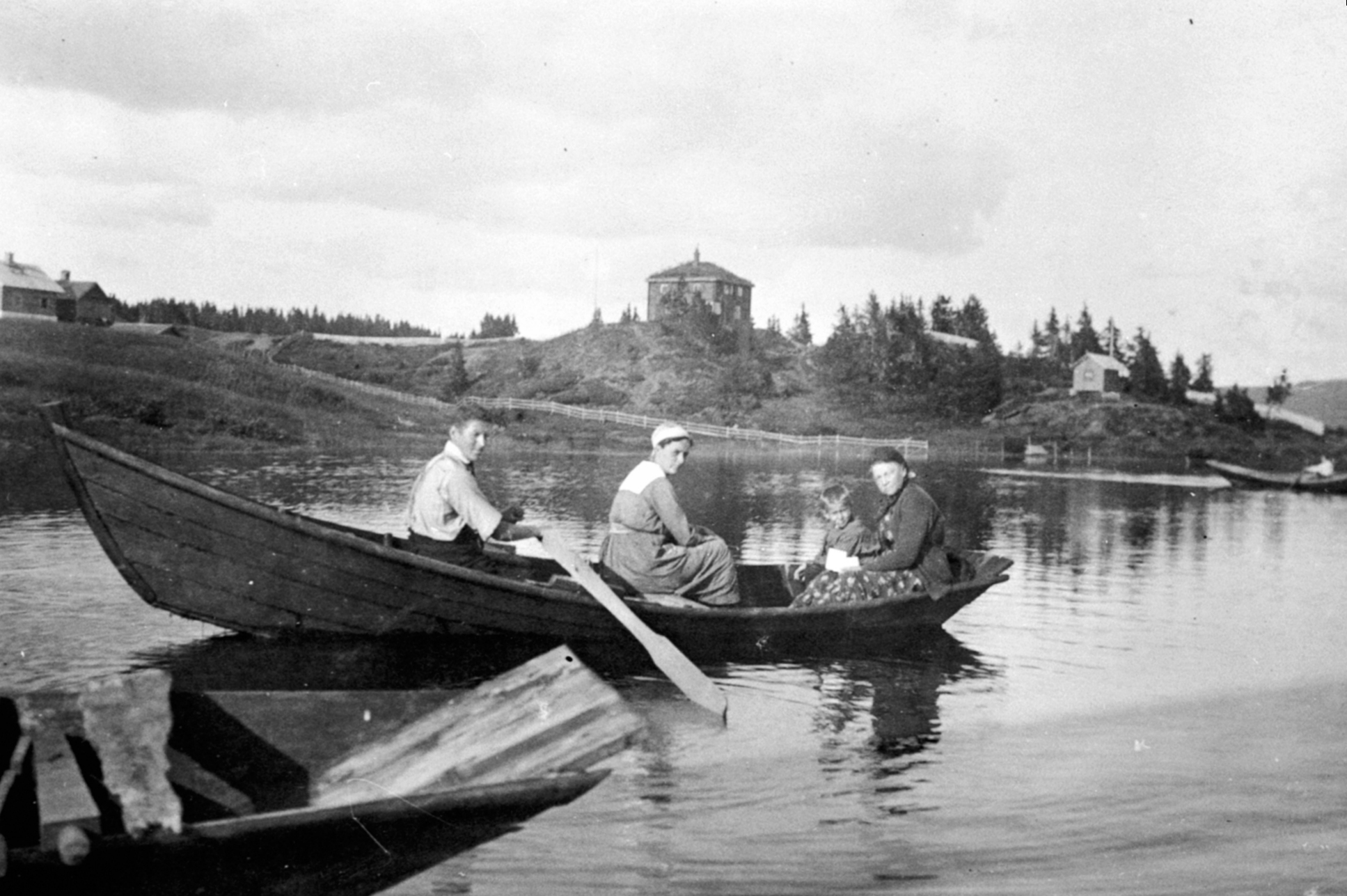 Robåt på Sjusjøen i Ringsaker, 1930